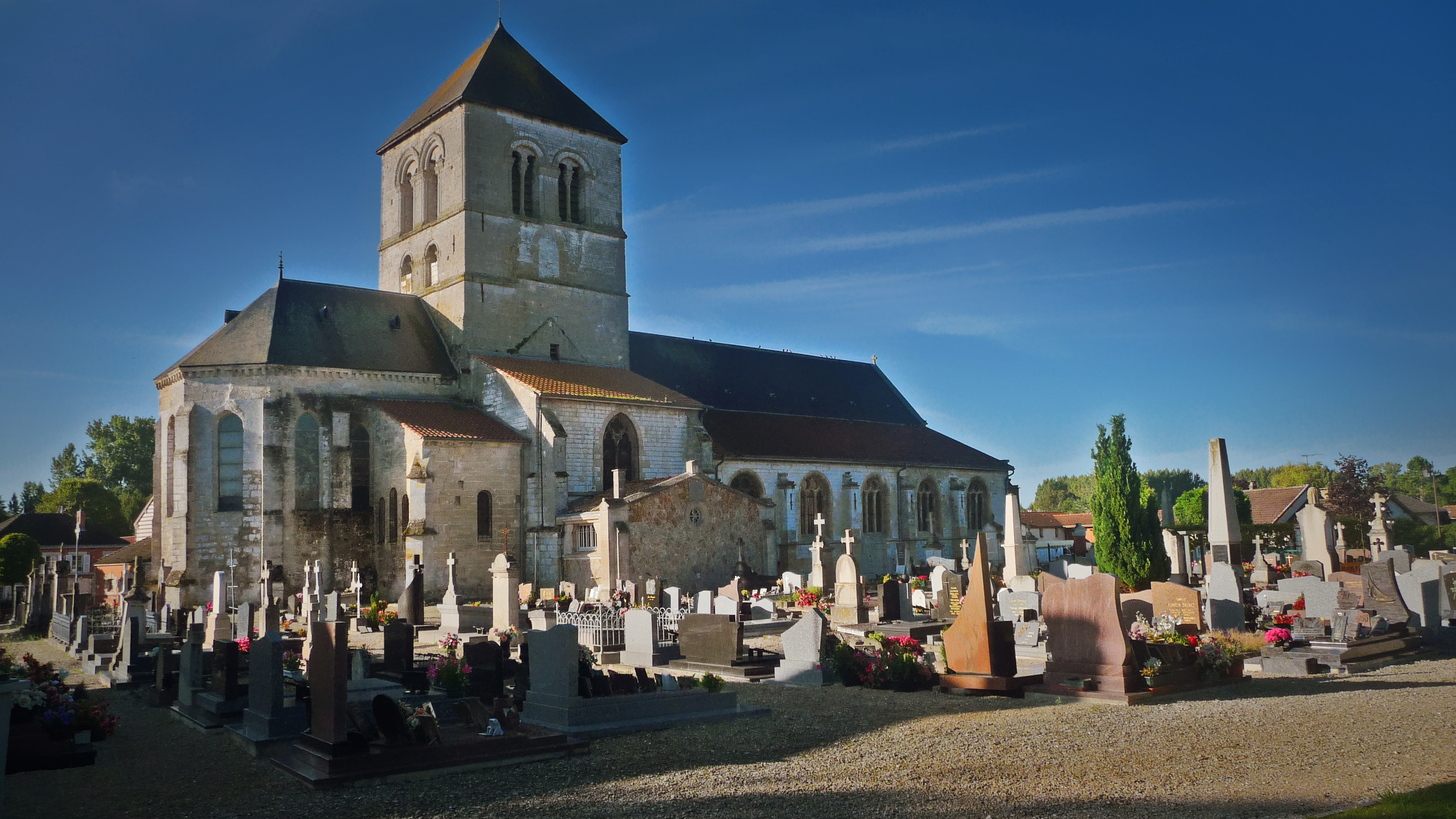 L'église Saint-Martin est mentionnée pour la première fois dans le polyptyque de l'abbaye de Saint-Remi de Reims, au IXe siècle. Cet ancien édifice a aujourd'hui disparu. L'église actuelle, classée, possède une nef romane charpentée de la première moitié du XIIe siècle, dont les murs sont percés de fenêtre en plein cintre. Elle fut reprise au XVIe siècle et dotée de chapiteaux historiés soigneusement sculptés (chimères, centaures, anges, sirènes, un homme et une femme les bras enlacés, des hommes caressant le visage d'une jeune fille, un femme ayant un homme sur les épaules et lui tenant les jambes; un ange tenant un écusson portant le mononogramme du Christ IHS etc…). De même, le transept du XIIe siècle fut remanié en 1520 par Guichard Antoine, comme l'atteste l'inscription "LAN MILLE V C ET XX GUICHARD ATOIE ICI ME MIST". Il porte une belle tour carrée romane à ouvertures géminées en plein cintre. Le chœur gothique à abside polygonale, avec deux chapelles rectangulaires, était achevé vers 1200. Les collatéraux ne sont pas contemporains : celui du sud est flamboyant ; celui du nord, de style Renaissance et achevé en 1555, fut construit par deux maîtres-maçons (Pierre Bernard et Arthur Clavyer), trois tailleurs de pierre ( Jean Laurent, Nicolas Legendre et Jean Rossy), tous les cinq de Châlons, et un certain Pierre Laurent dit Gobillart, de l'Epine, dont le métier n'est pas précisé. La façade est percée, comme la nef, de trois portails d'époque différente. .